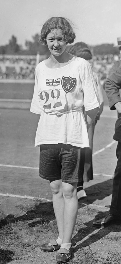 20-8-22, [stade] Pershing, [à d.] Miss Hatt, gagnantes du saut en hauteur [meeting international d'athlétisme féminin] : [photographie de presse] / [Agence Rol]